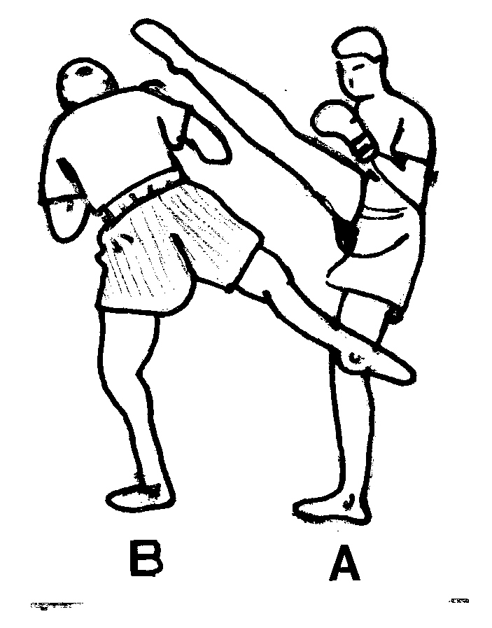 contre5.jpg